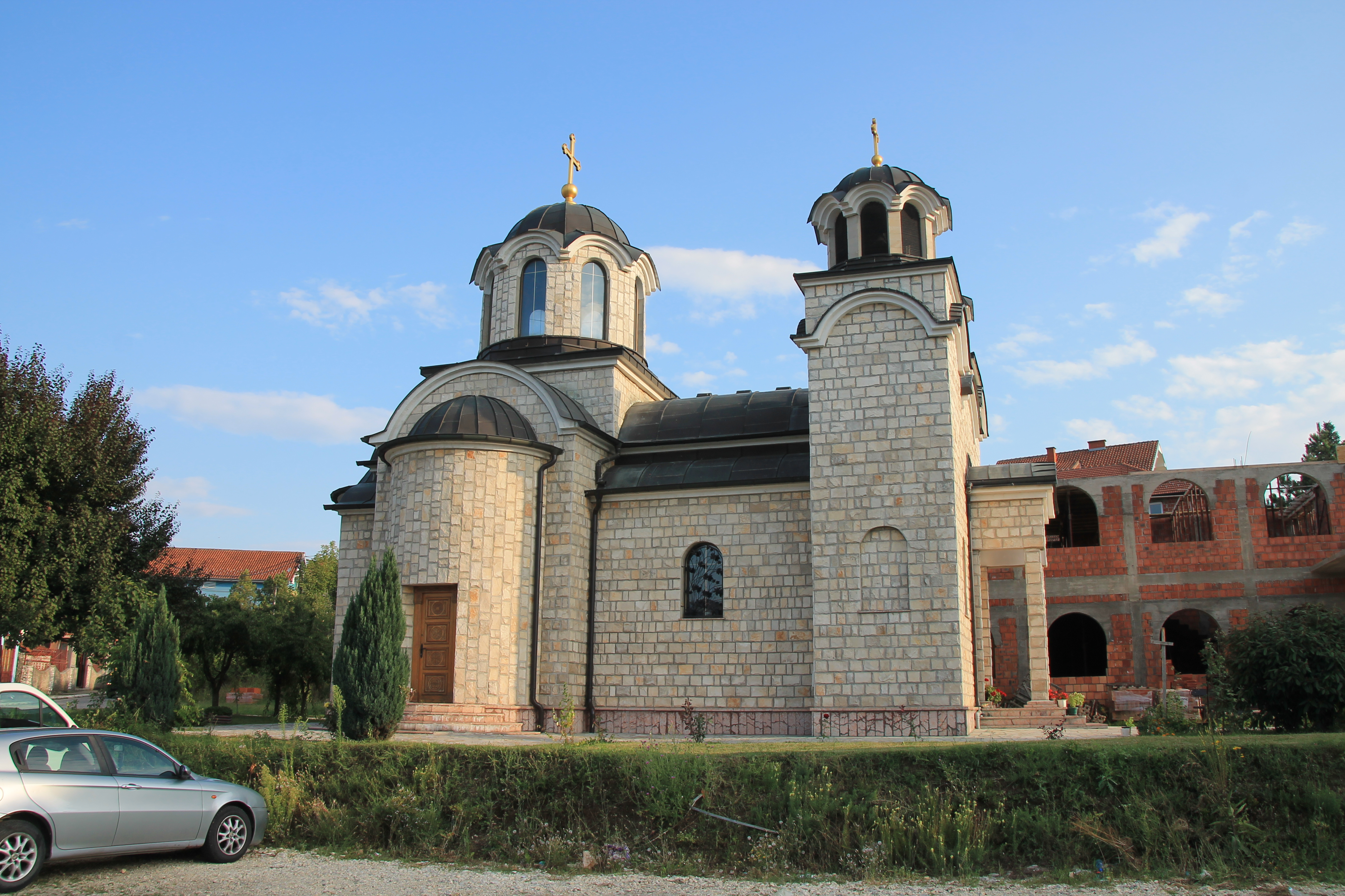 Crkva Sv. Dimitrija (Kragujevac)